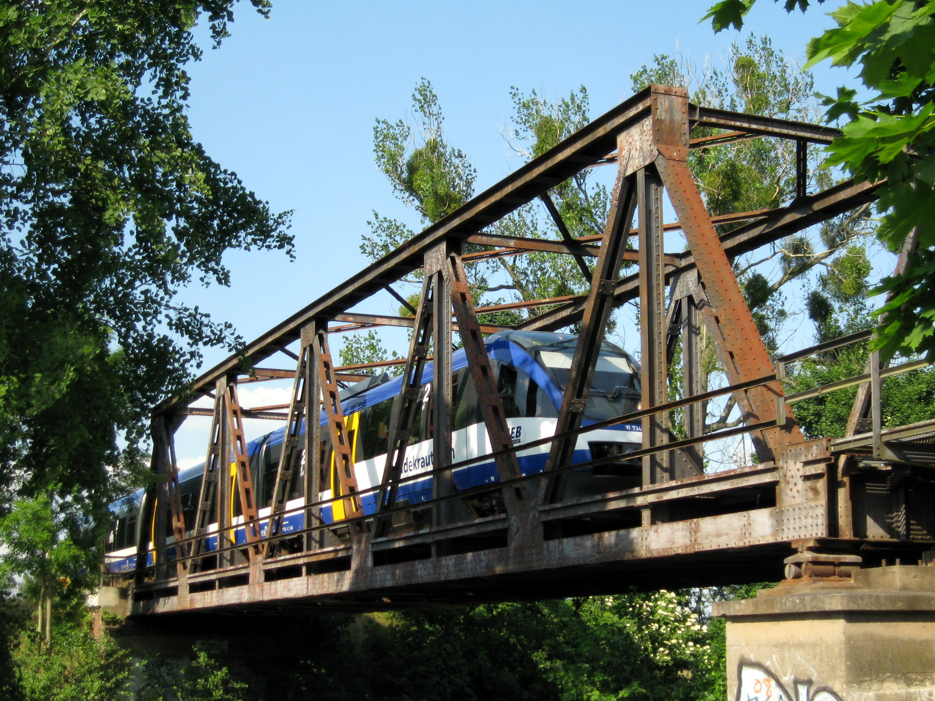 Brücke über den Finowkanal in Zerpenschleuse, Gemeinde Wandlitz, Landkreis Barnim, Land Brandenburg, Deutschland